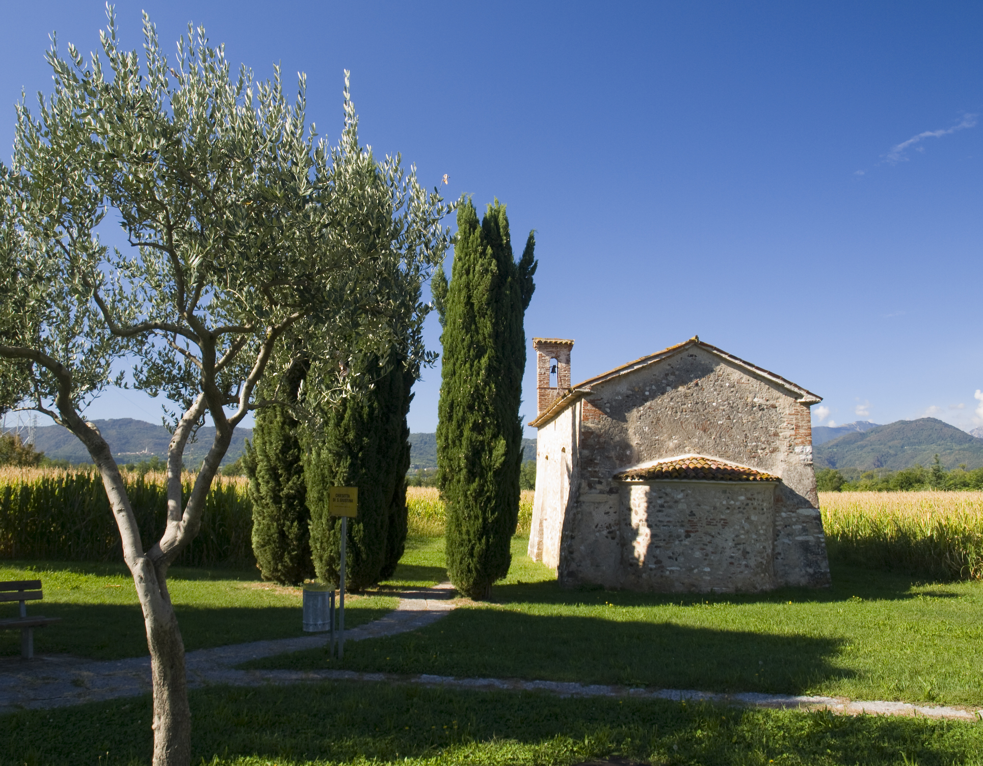 Chiesa di Santa Giustina This is a photo of a monument which is part of cultural heritage of Italy.